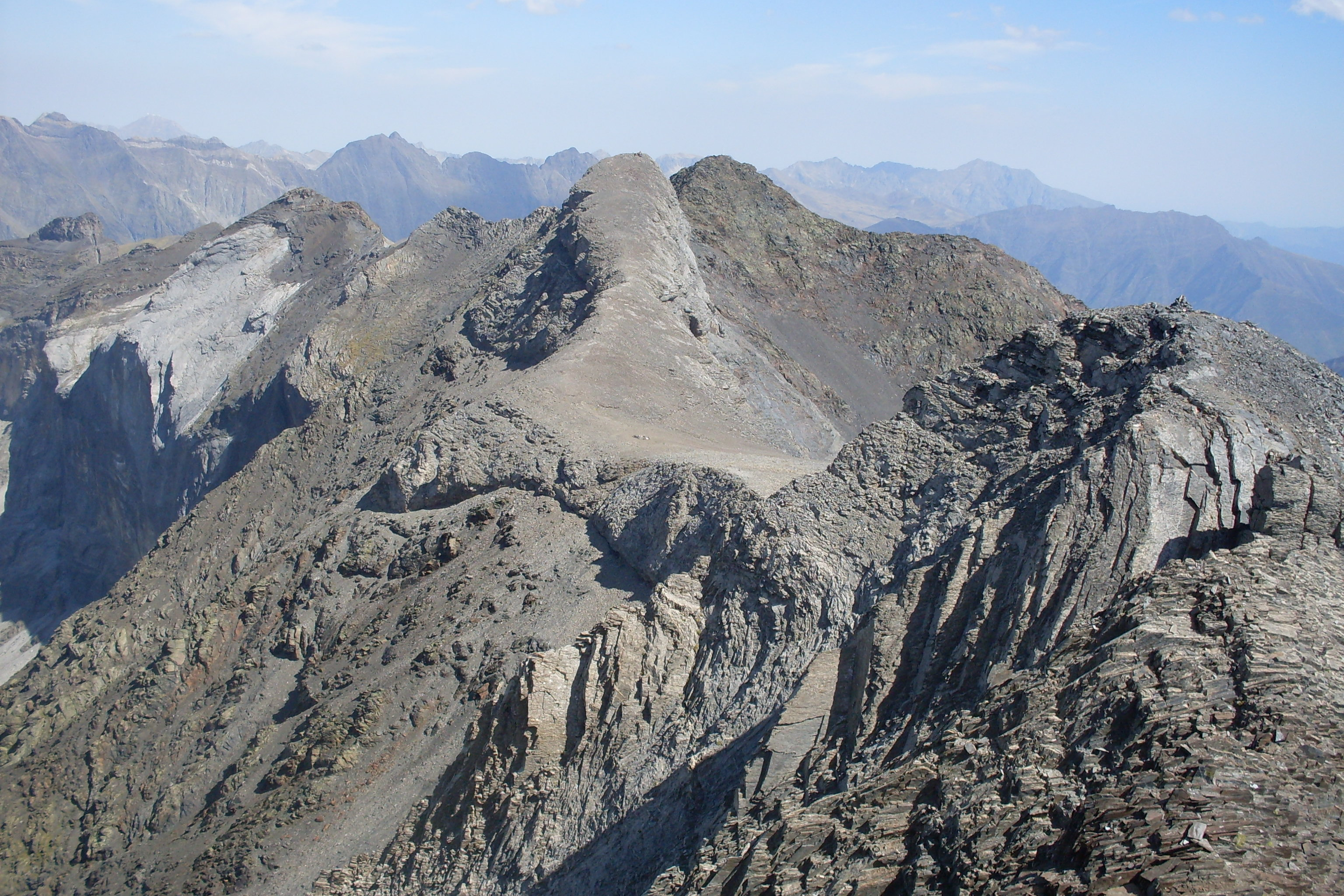 Face sud-ouest des pics de Serre Mourène et Troumouse depuis la Munia, août 2009